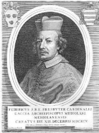 Ritratto del Cardinale Federico Caccia (1635-1699), arcivescovo di Milano.